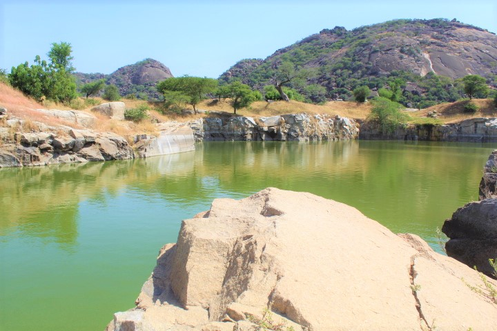 Le lac aux crocodiles est un vaste étendu d'eau qui réceuille les crocodiles. Situé à Boboyo dans l'arrondissement de Kaélé